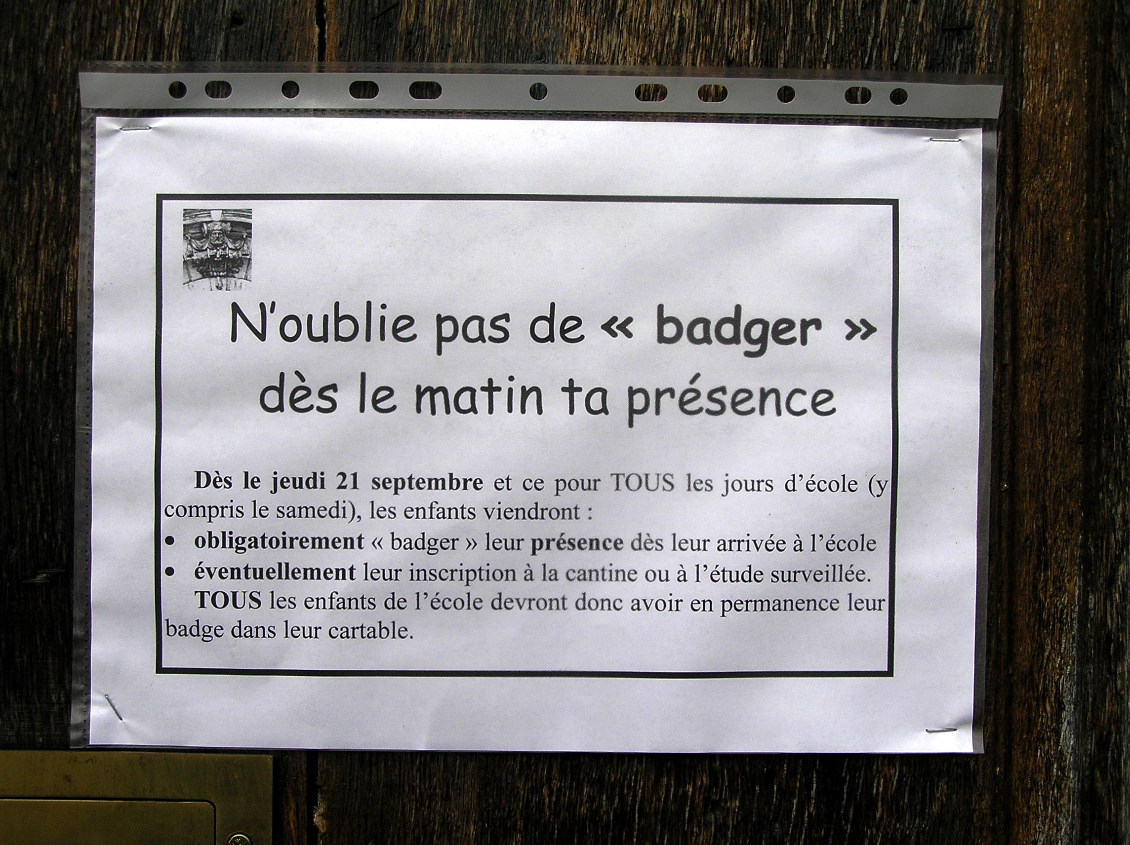 Affiche rappelant l'obligation pour les enfants de « badger » à l'école